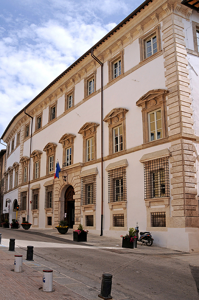 Antico palazzo della famiglia Mauri, ora sede della Biblioteca Comunale